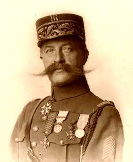 Le Général Georges Demetz